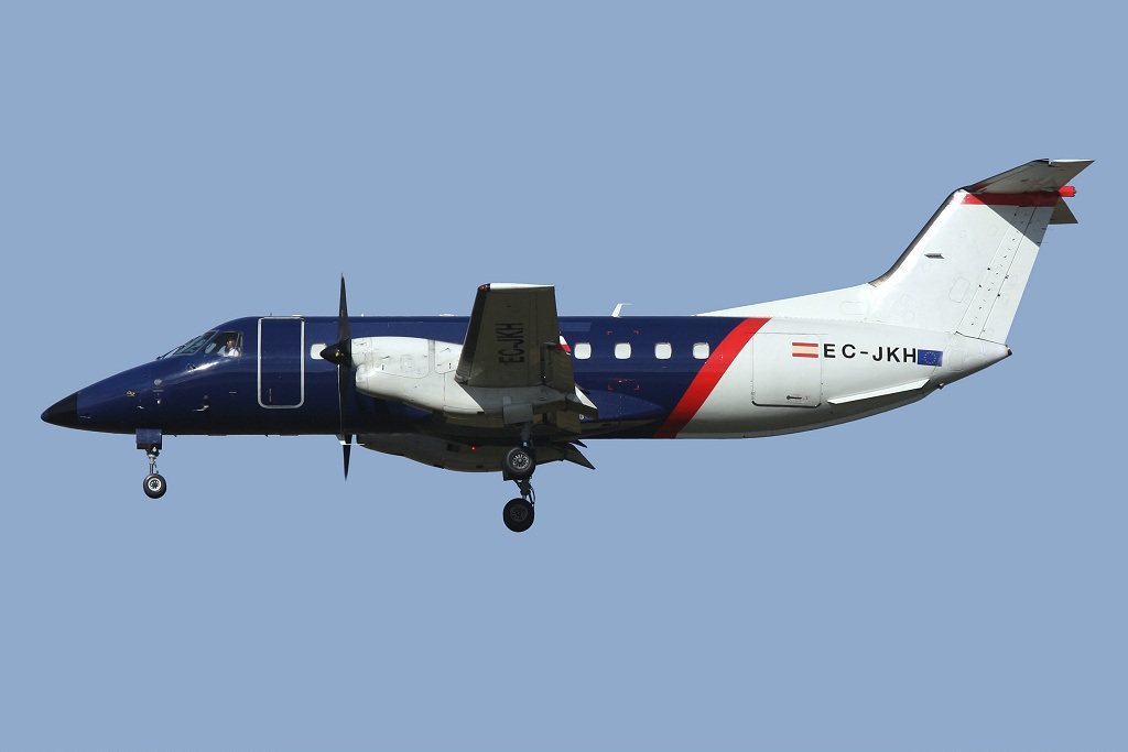 Embraer EMB-120RT Brasilia Barcelona (- El Prat) (BCN / LEBL) Spain, November 27, 2010 EC-JKH (cn 120092)